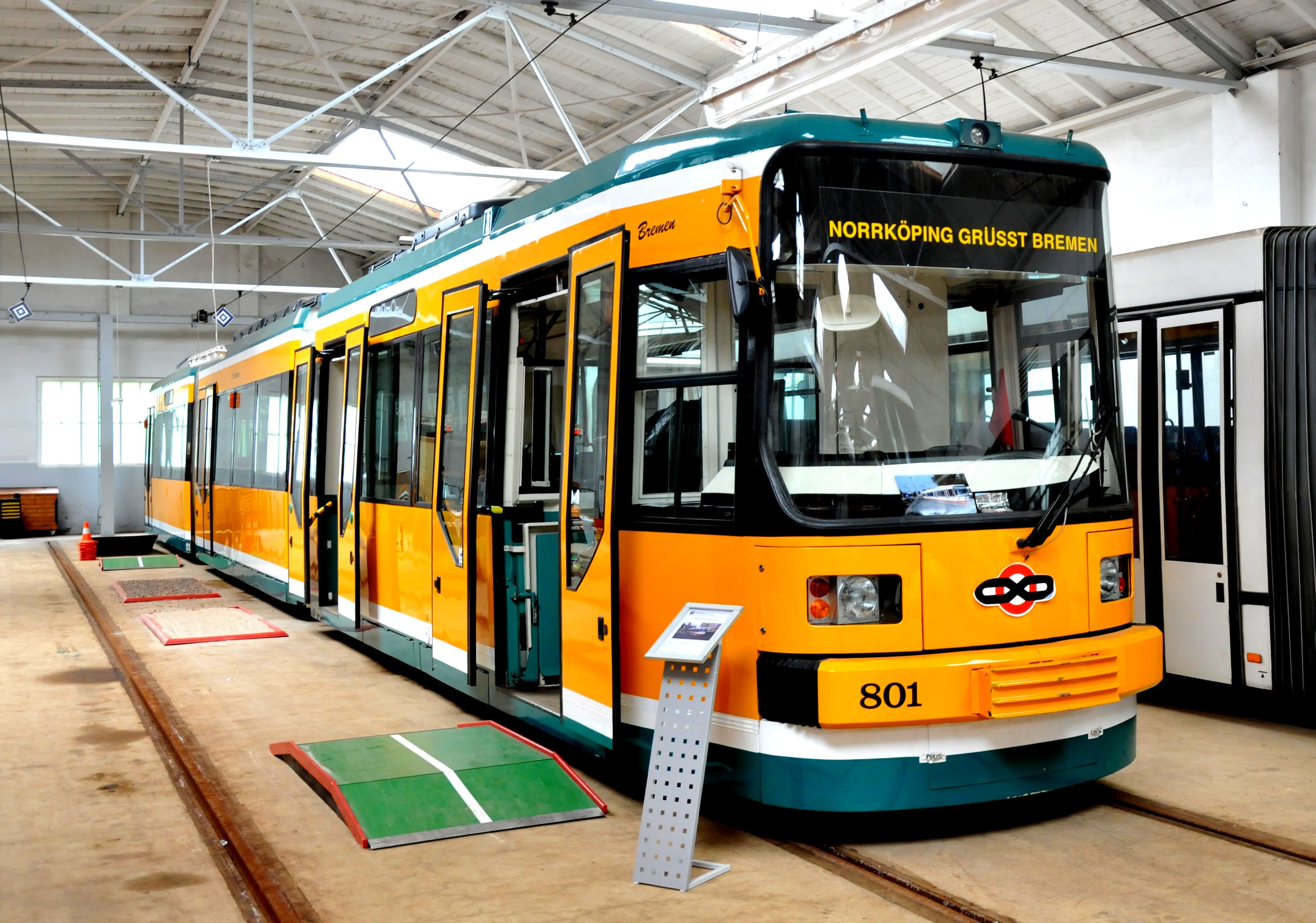 Tram 801 (later vernummerd in 3801) van het type GT6N bij de Bremer Straßenbahn AG. Deze tram was van 20-04-1993 t/m 18-05-1993 als tram 601 bij het GVB in Amsterdam, Nederland. Na 13 jaar inzet was de wagen in Zweden niet meer nodig en kon hierdoor op 12-06-2011 terugkeren naar Bremen. Sindsdien is de niet rijvaardige wagen onderdeel van het Bremer Straßenbahnmuseum "Das Depot" in Bremen-Sebaldsbrück, hier aanwezig in de Norrköping kleurstelling.